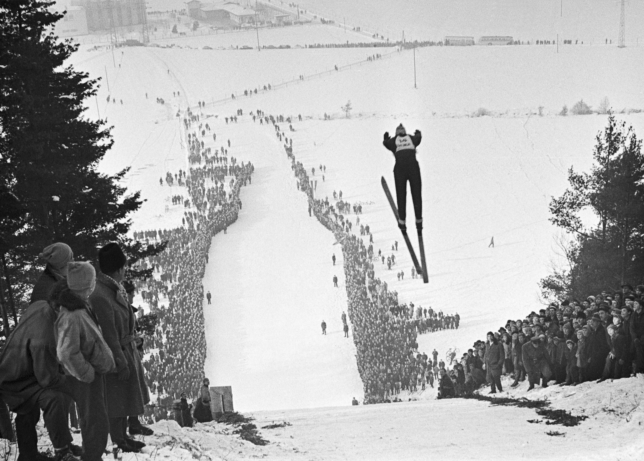 Tekmovanje za prvenstvo Slovenije v smučarskih skokih na Pekrski gorci